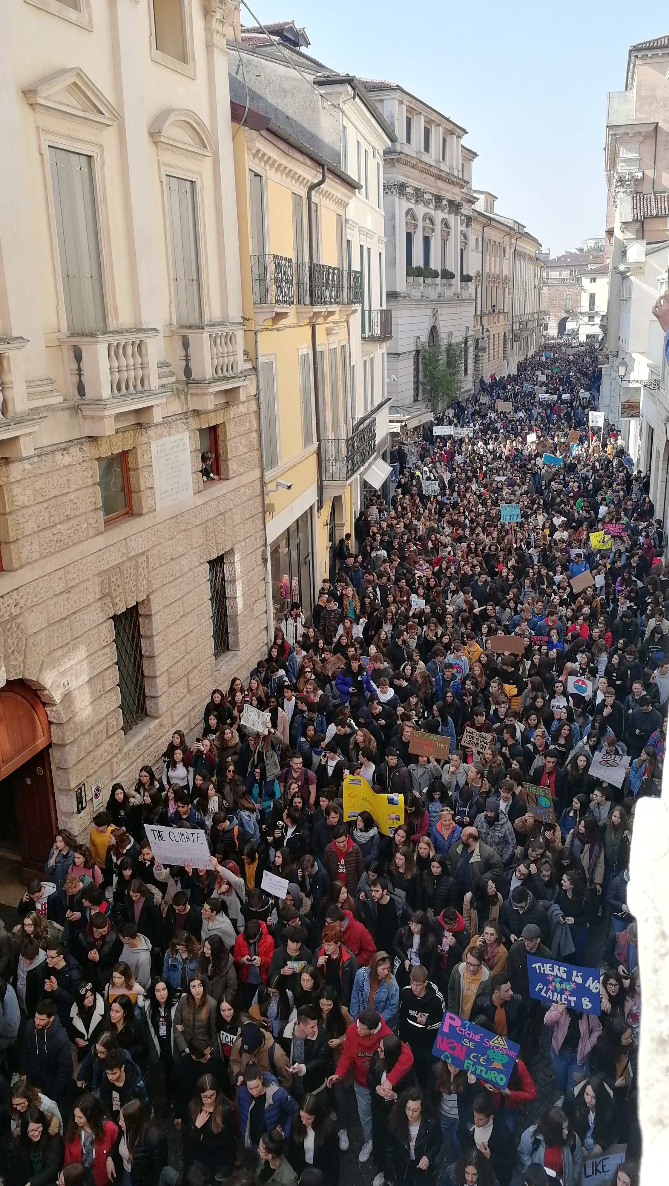 Demonstrators at Fridays for Future in Corso Palladio, Vicenza, 15th March 2019